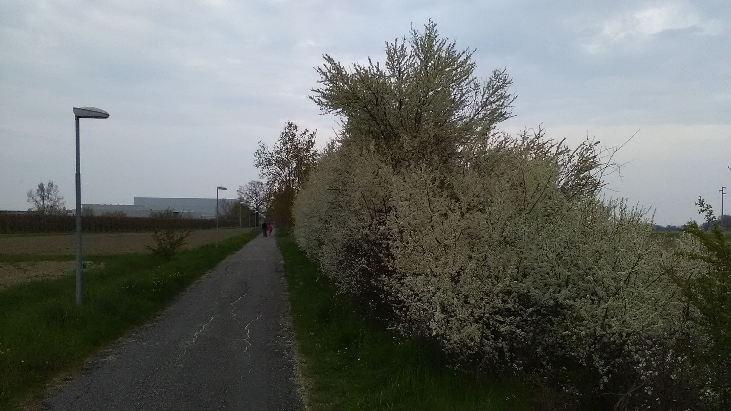 Pista ciclabile Chico Mendez (Mirandola)